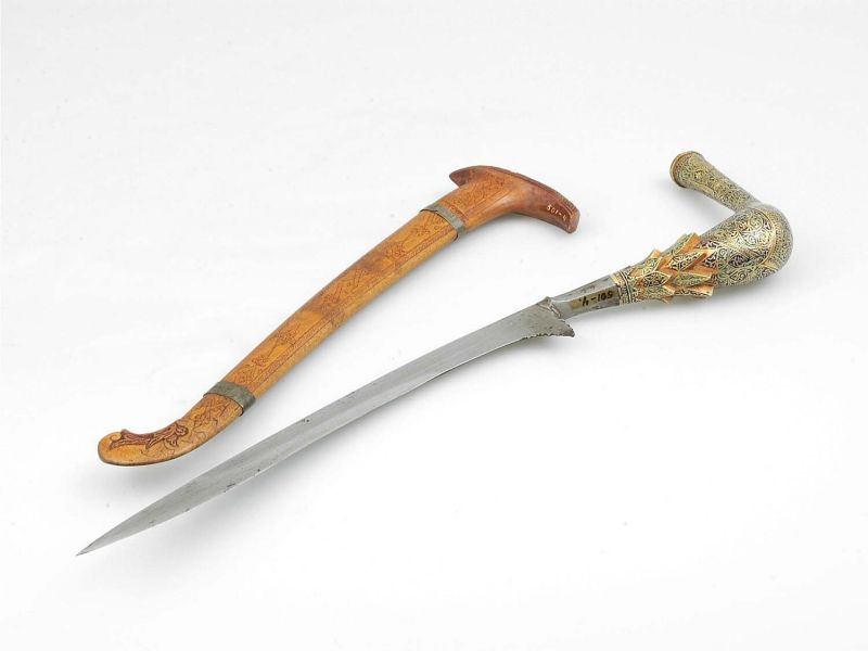 Kris (onderdeel). IJzeren lemmet met een houten schede: D.I. Aceh, Rencong Unknown language: Reuntjöng